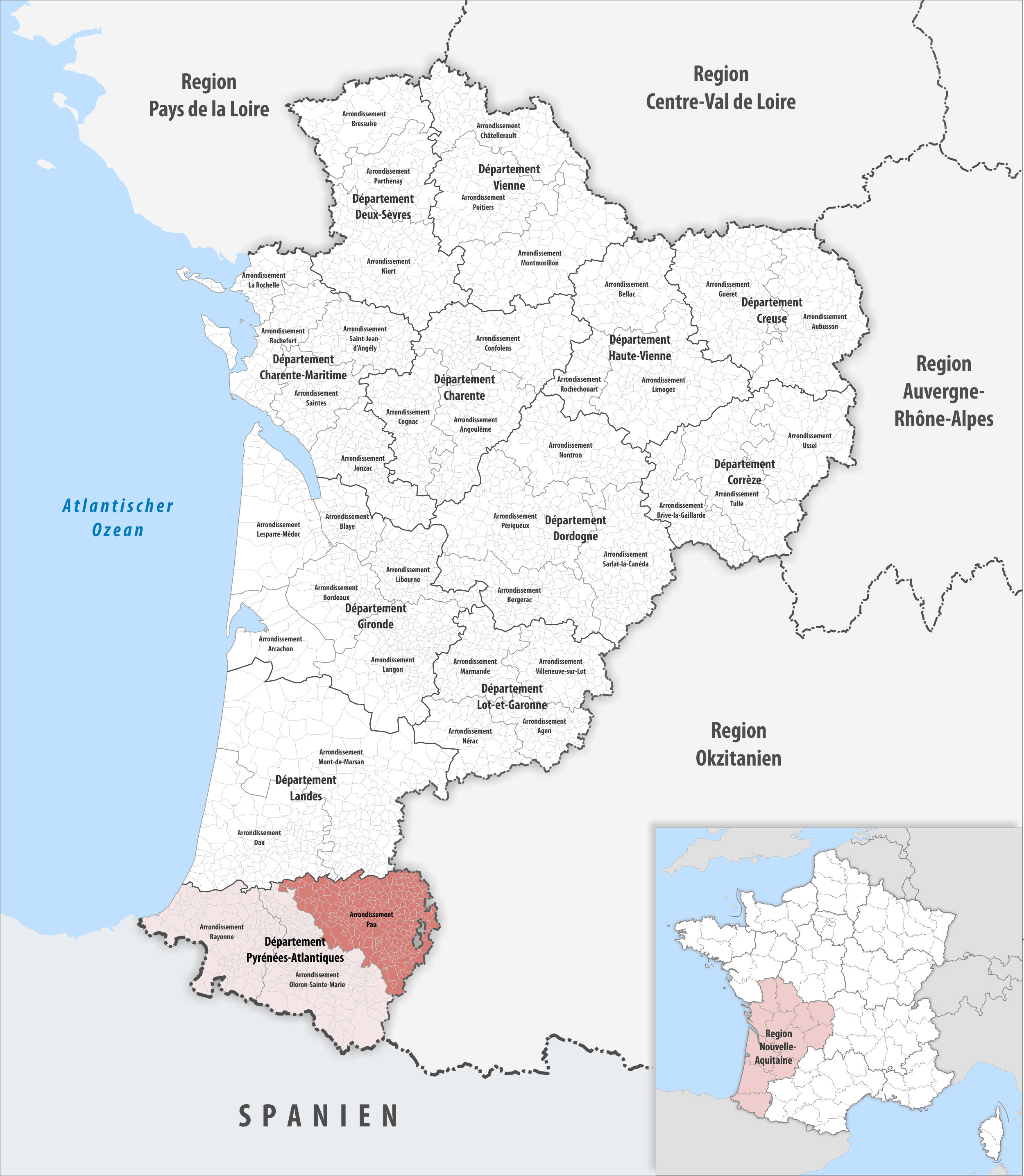 Lage des Arrondissements Pau